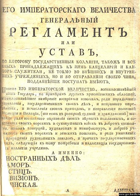 Генеральный регламент или устав, по которому государственные коллегии, також и все оных принадлежащих к ним канцелярий и контор служители, не токмо во внешних и внутренних учреждениях, но и во отправлении своего чина, подданнейше поступать имею